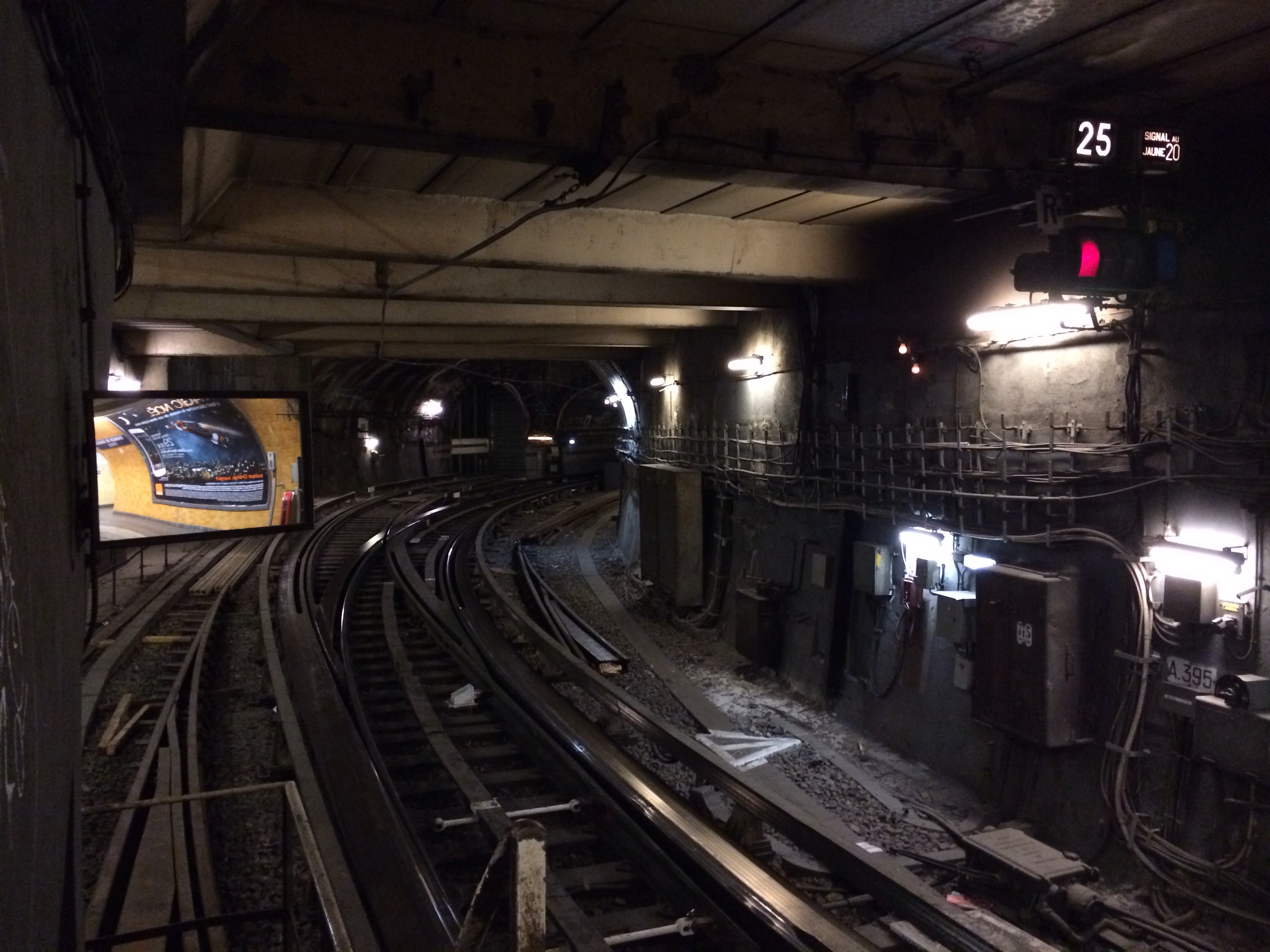 Tunnel ligne 6 et raccordement ligne 1 / ligne 6 du métro de Paris.